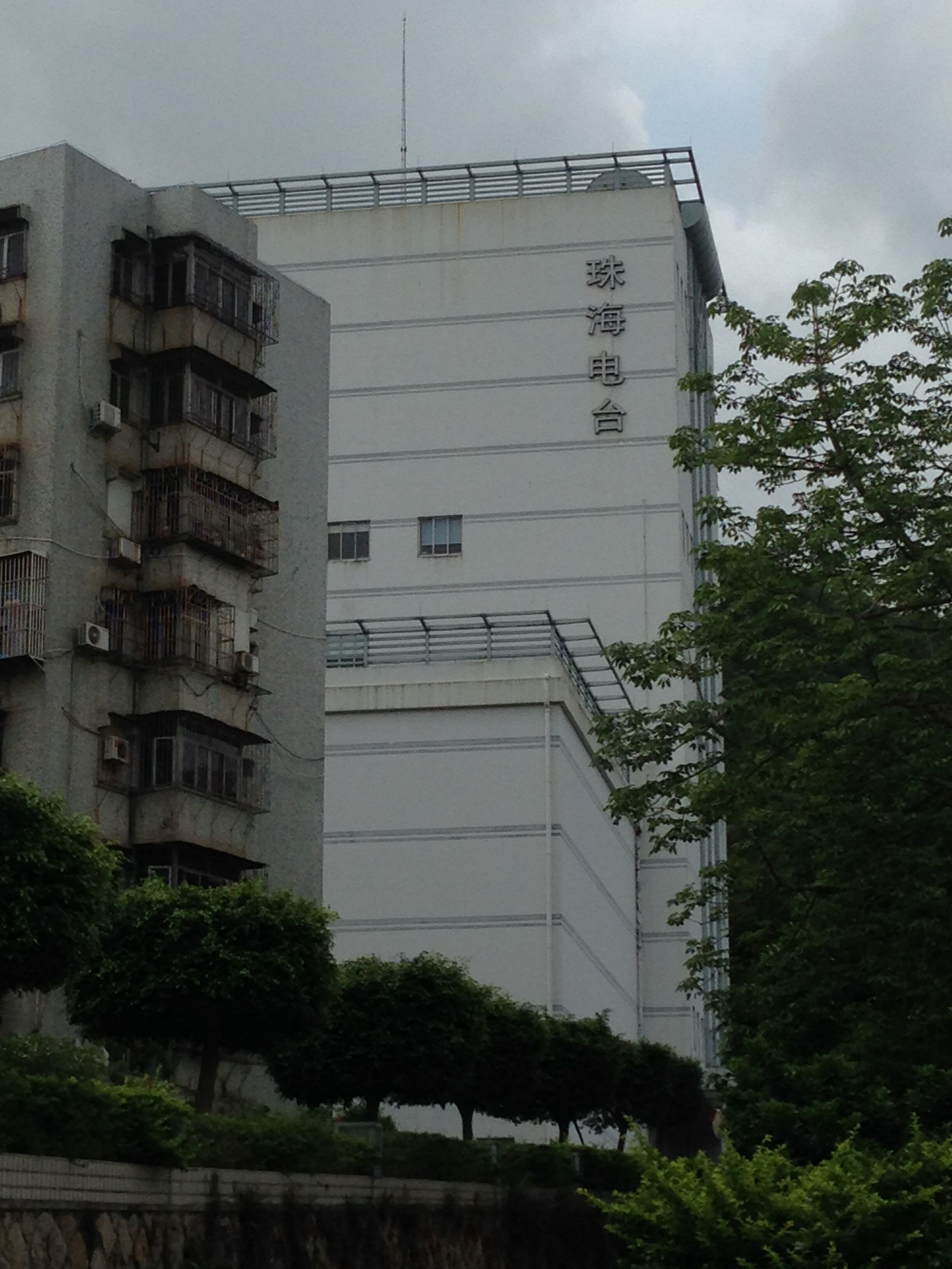 珠海电台大楼